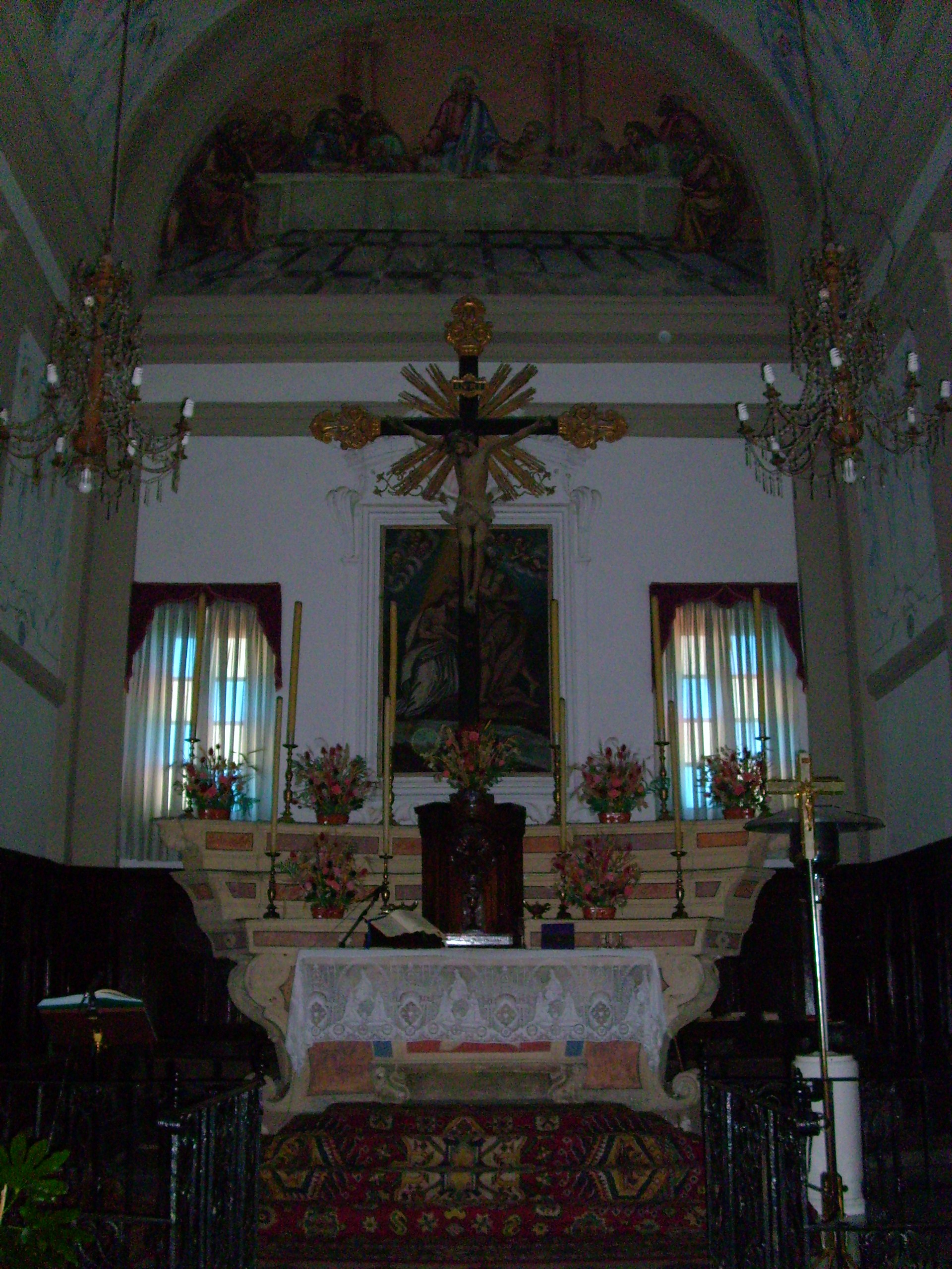 Chiesa di San Giovanni Battista di Suvero, Rocchetta di Vara, Liguria, Italy